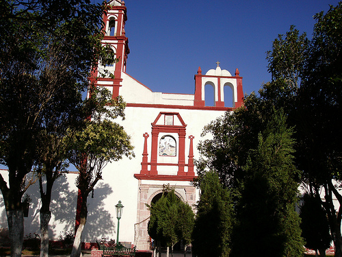 En esta imagen se muestra la Iglesia de San Juan Bautista